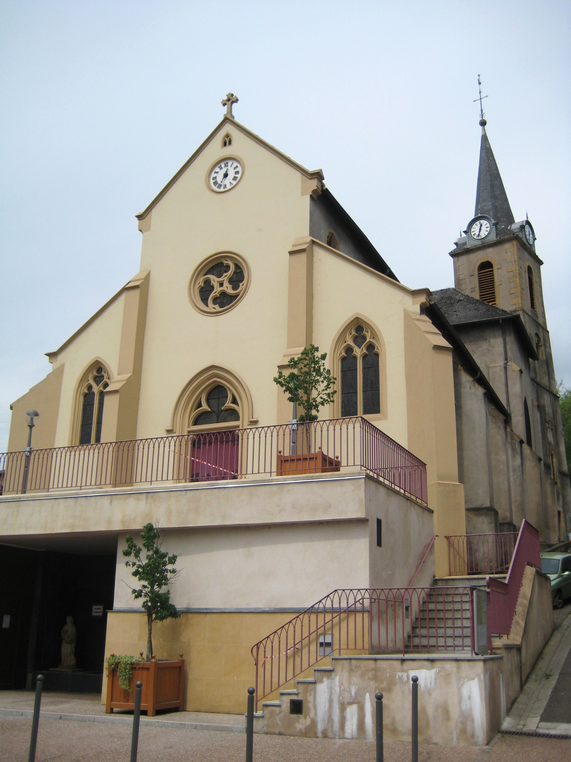 Église de Rosselange